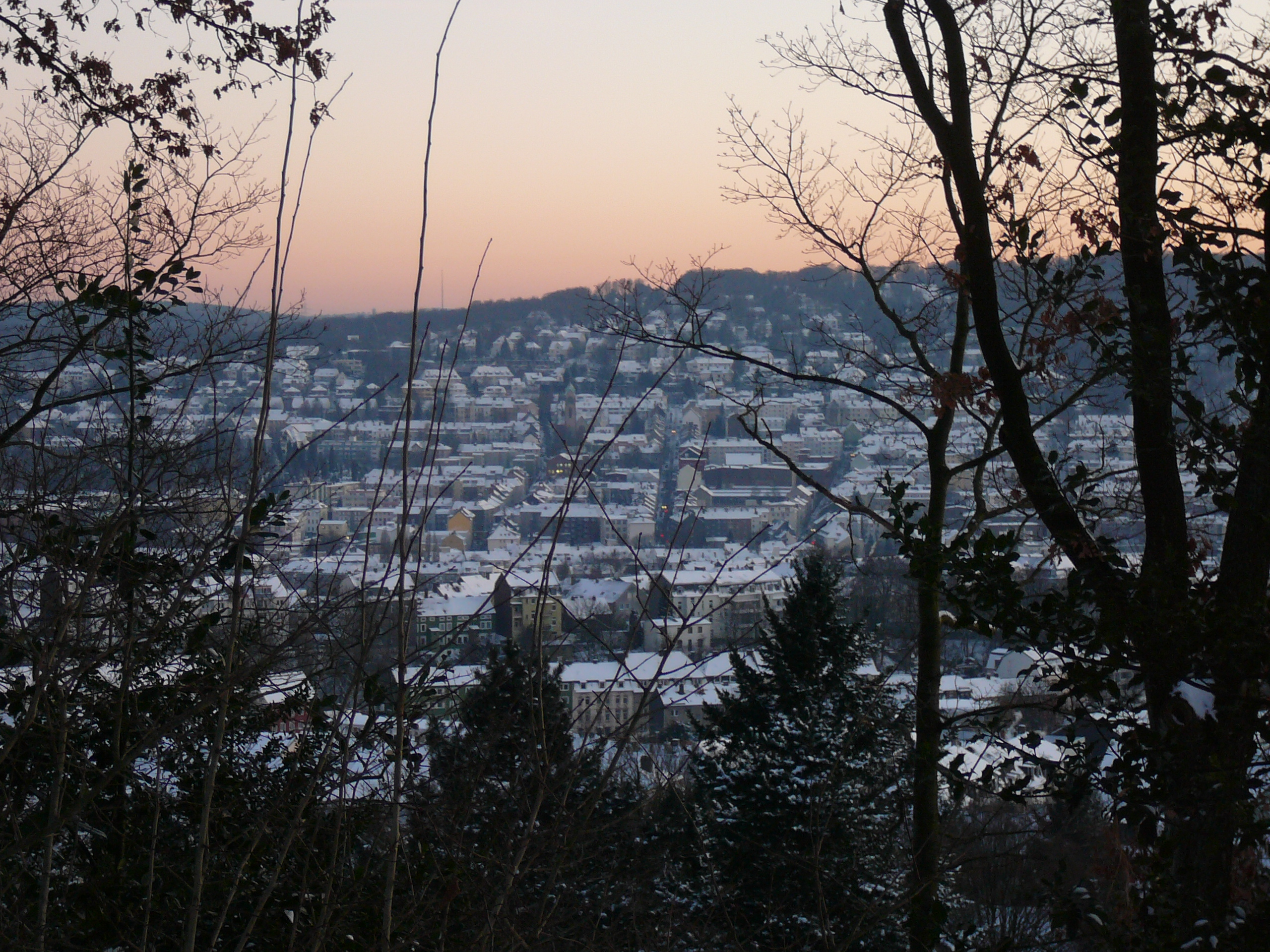 Nordpark, Wuppertal